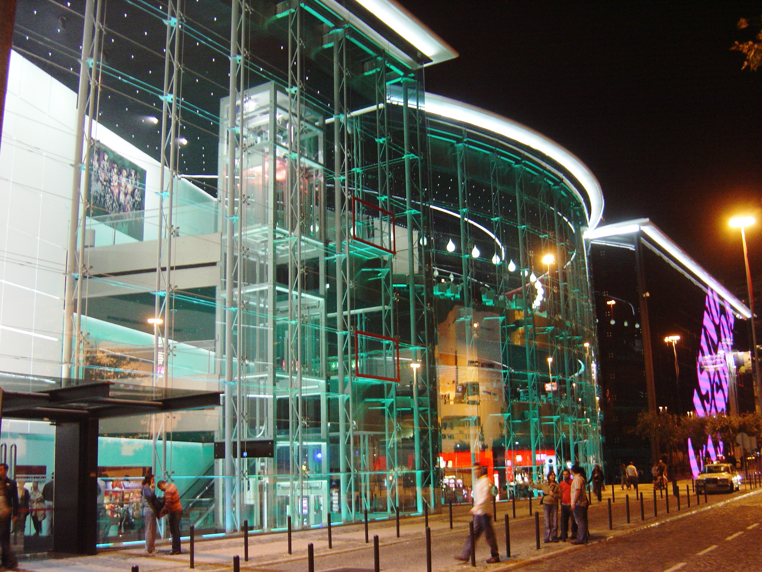 Lisbon Casino, Portugal